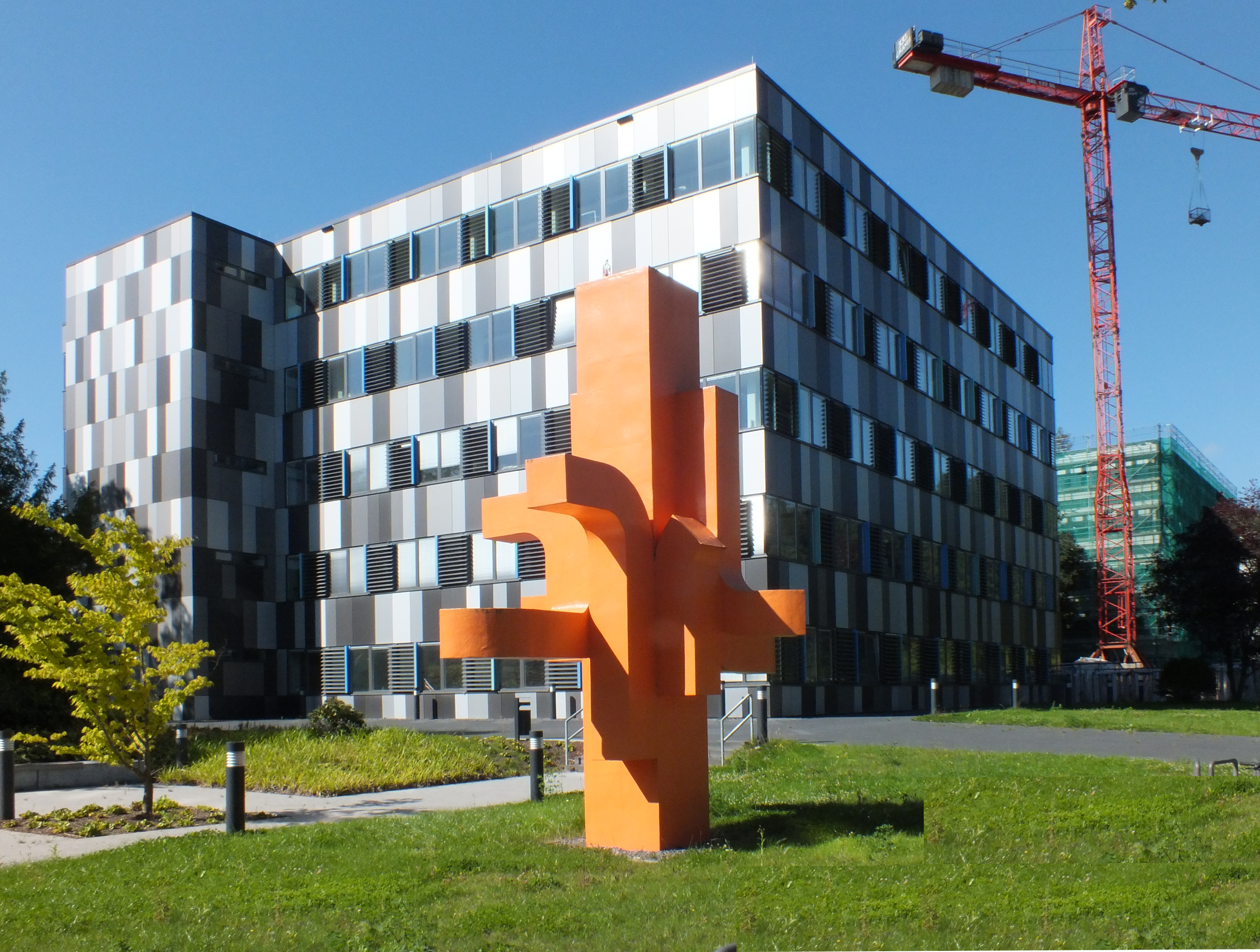 Hochschule Trier, Hauptcampus (Standort Schneidershof) - Gebäude D nach der Renovierung und das alte Logo als Plastik